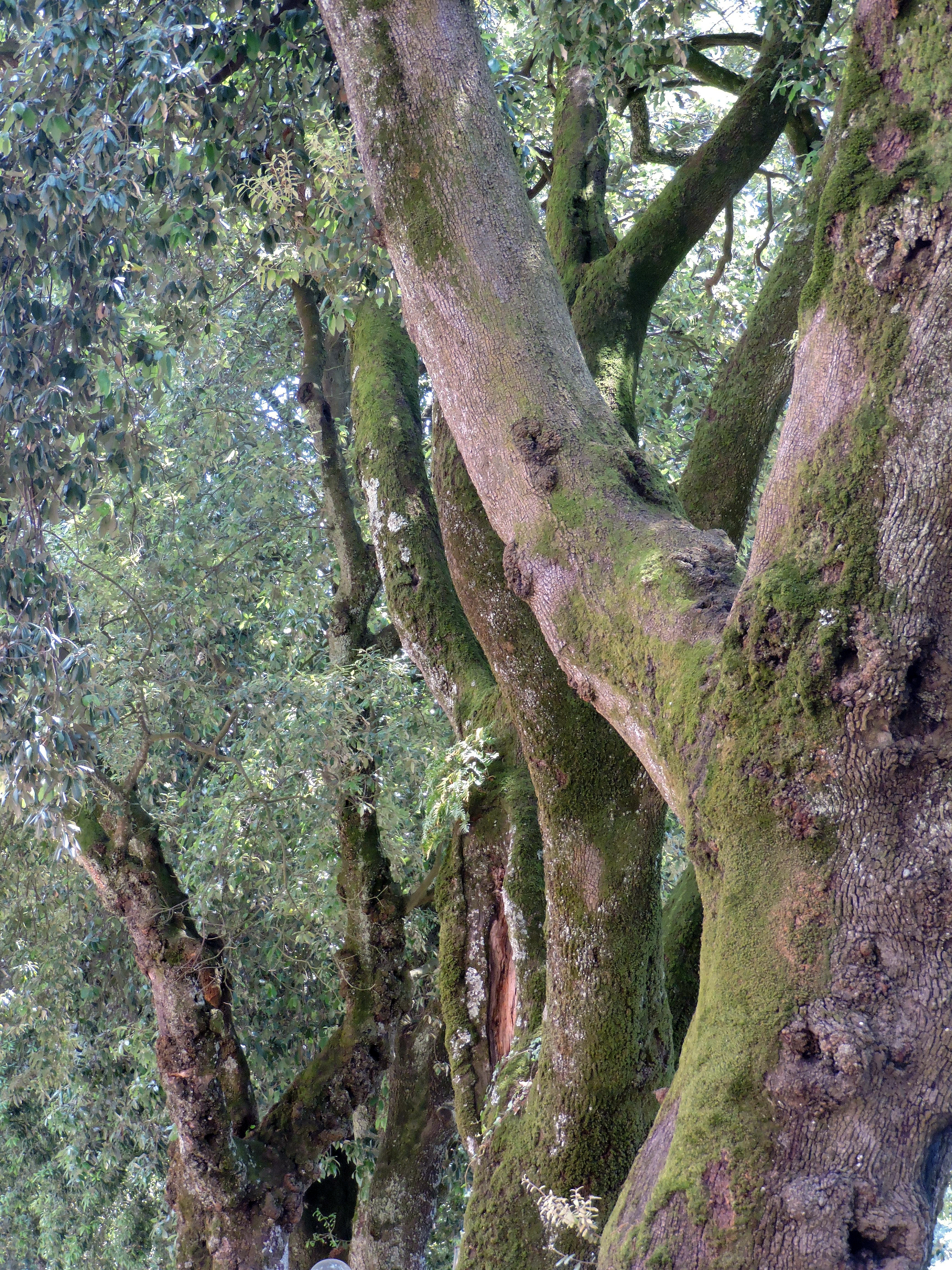 Santuario del Soviore: i lecci monumentali davanti alla foresteria This is a photo of a monument which is part of cultural heritage of Italy.